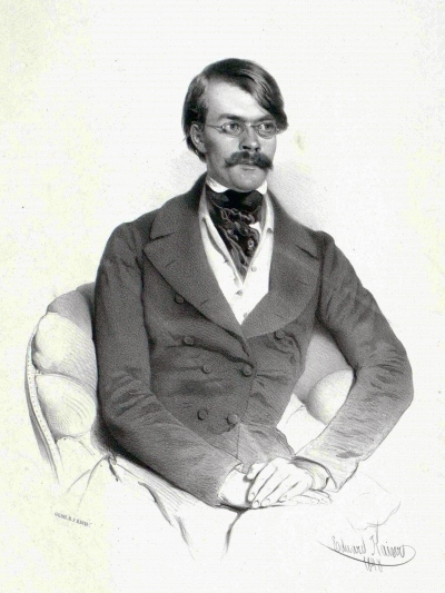 Rudolf Brestel (1816–1881)